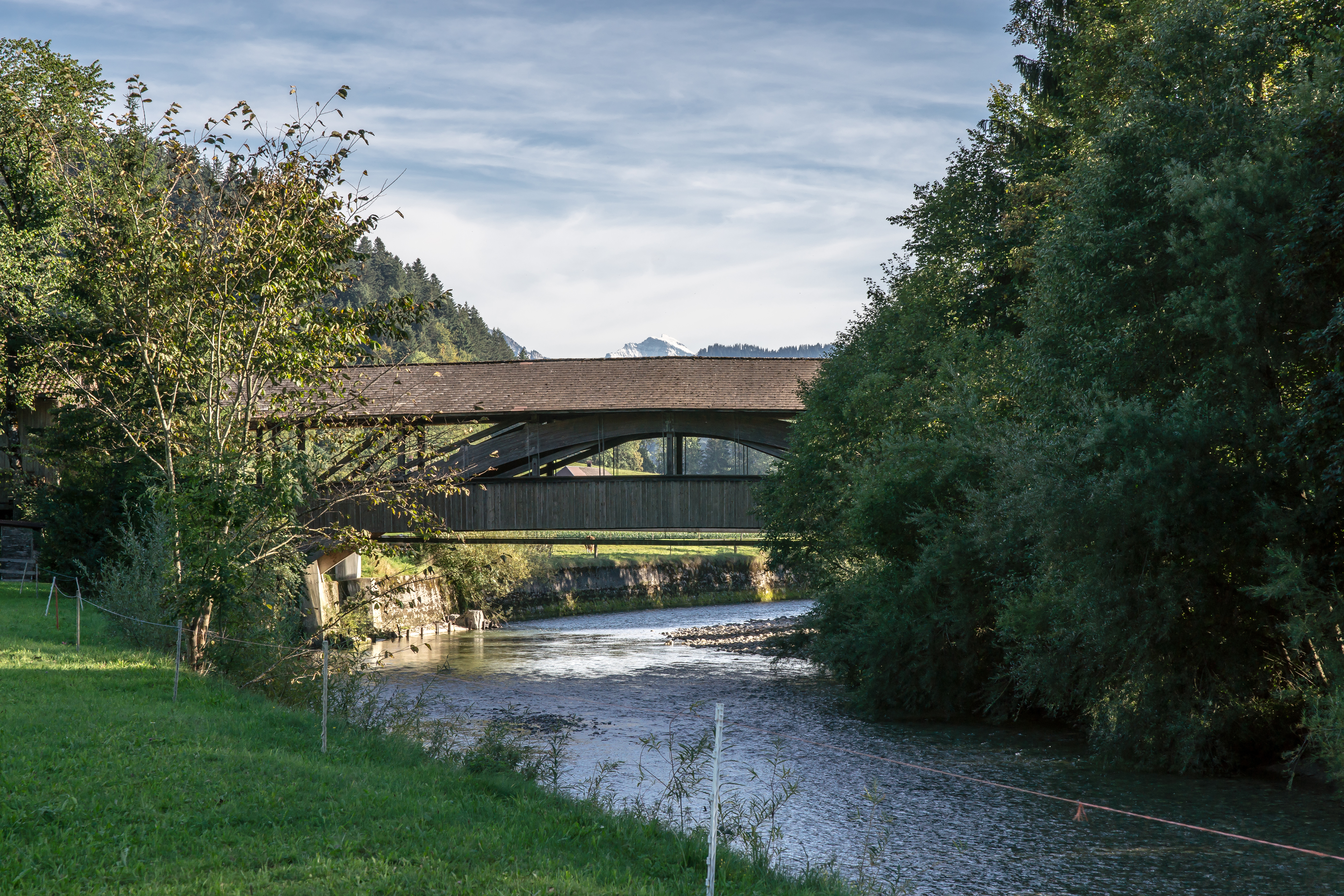 Dieboldswilbrücke über die Emme